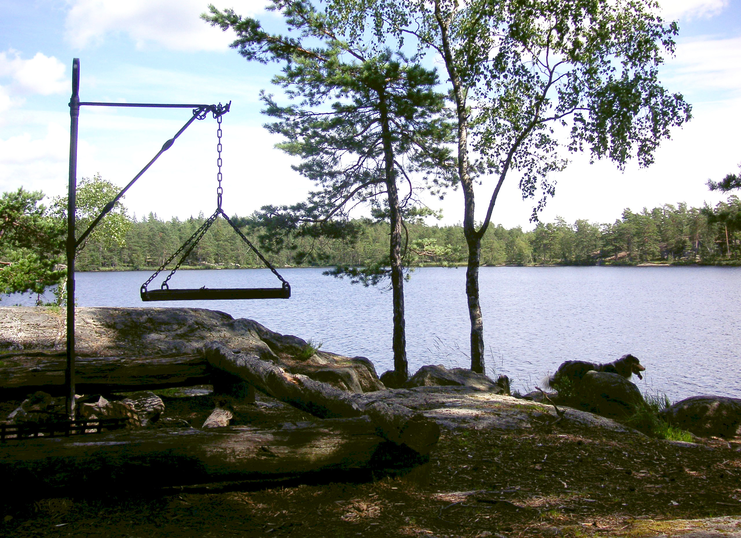 Långsjön i Paradisets naturreservat